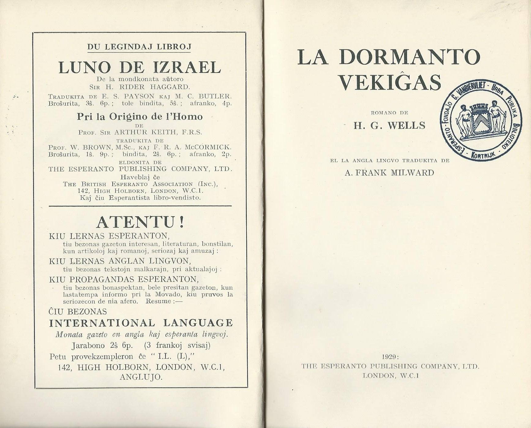 kovrilo de "La Dormanto Vekiĝas", 1929